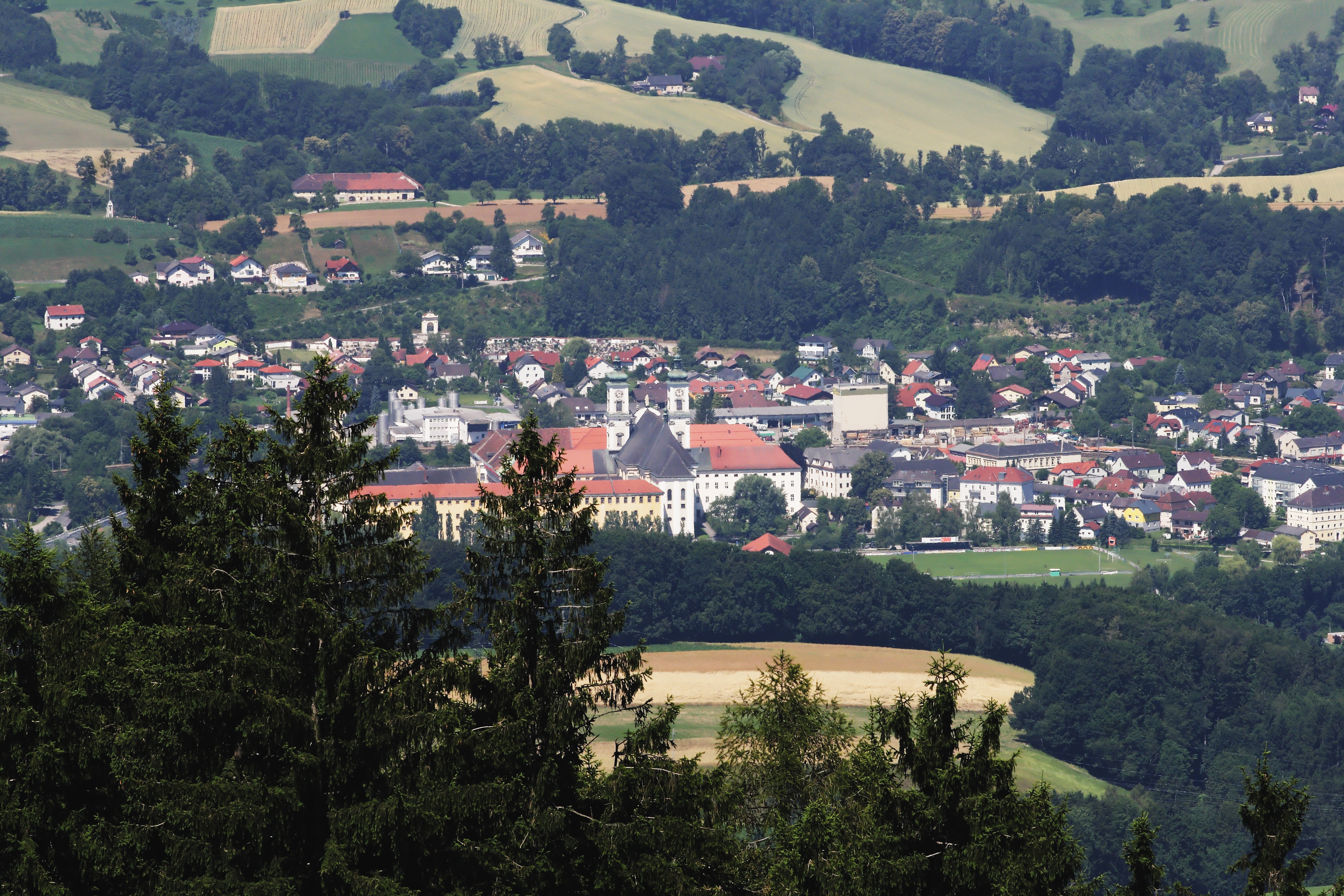 Blick von der Dambergwarte auf Garsten